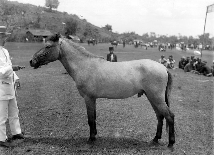 Negatief. Hengst op de paardententoonstelling te Lombok